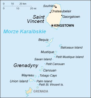 Mapa Saint Vincent i Grenadynów na podstawie CIA World Factbook